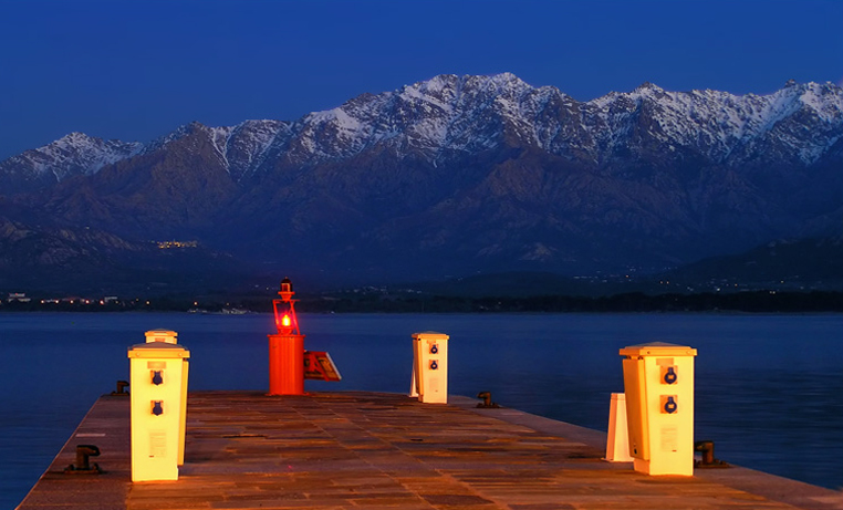 Au pied du Monte Grosso, à gauche Montemaggiore et à droite Calenzana